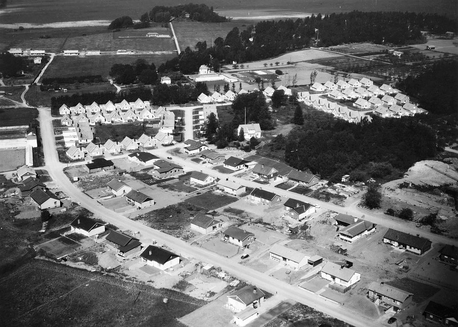 Flygfoto över Träkvista med Närlunda.